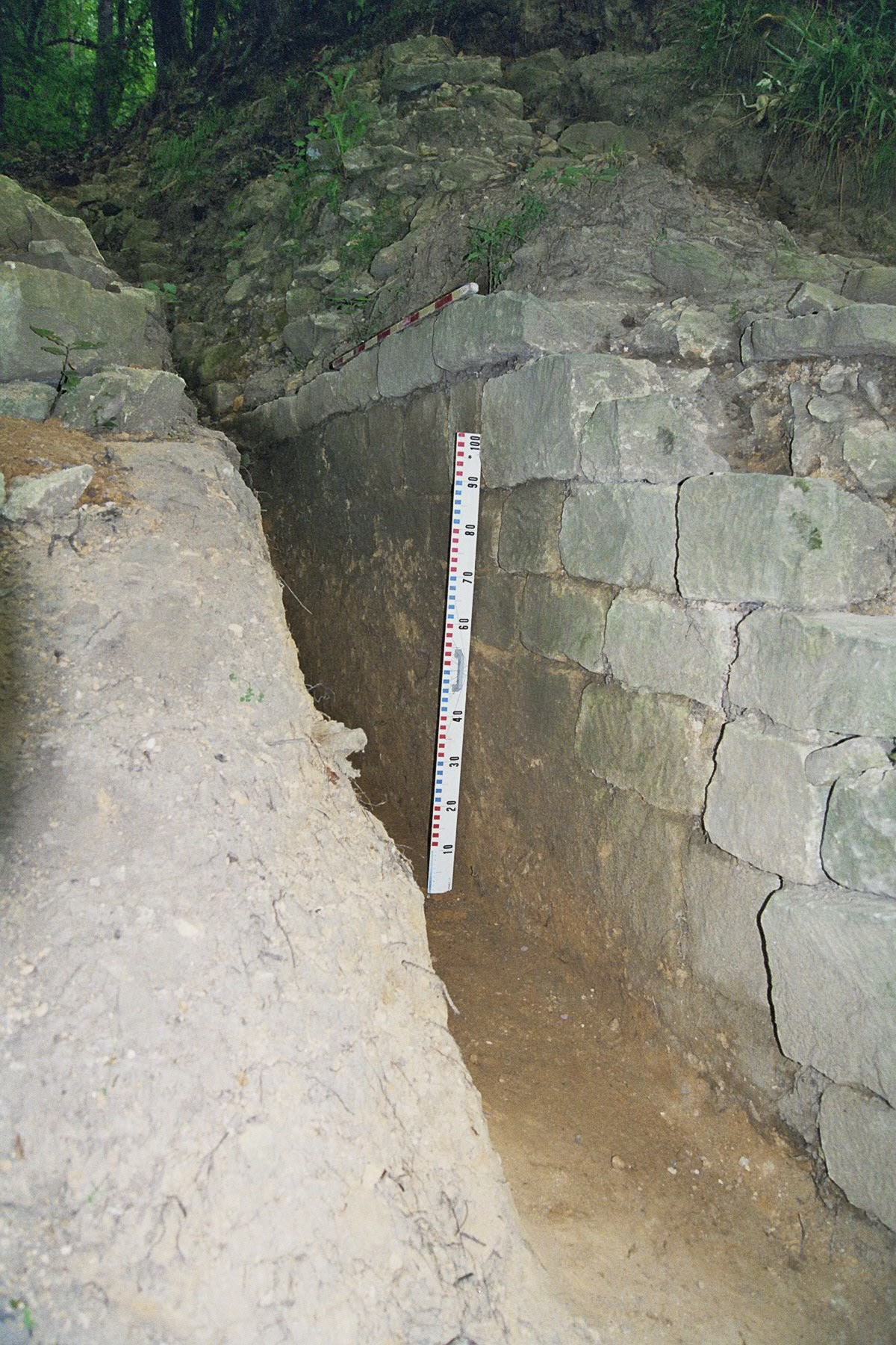 Südliches Mauerwerk